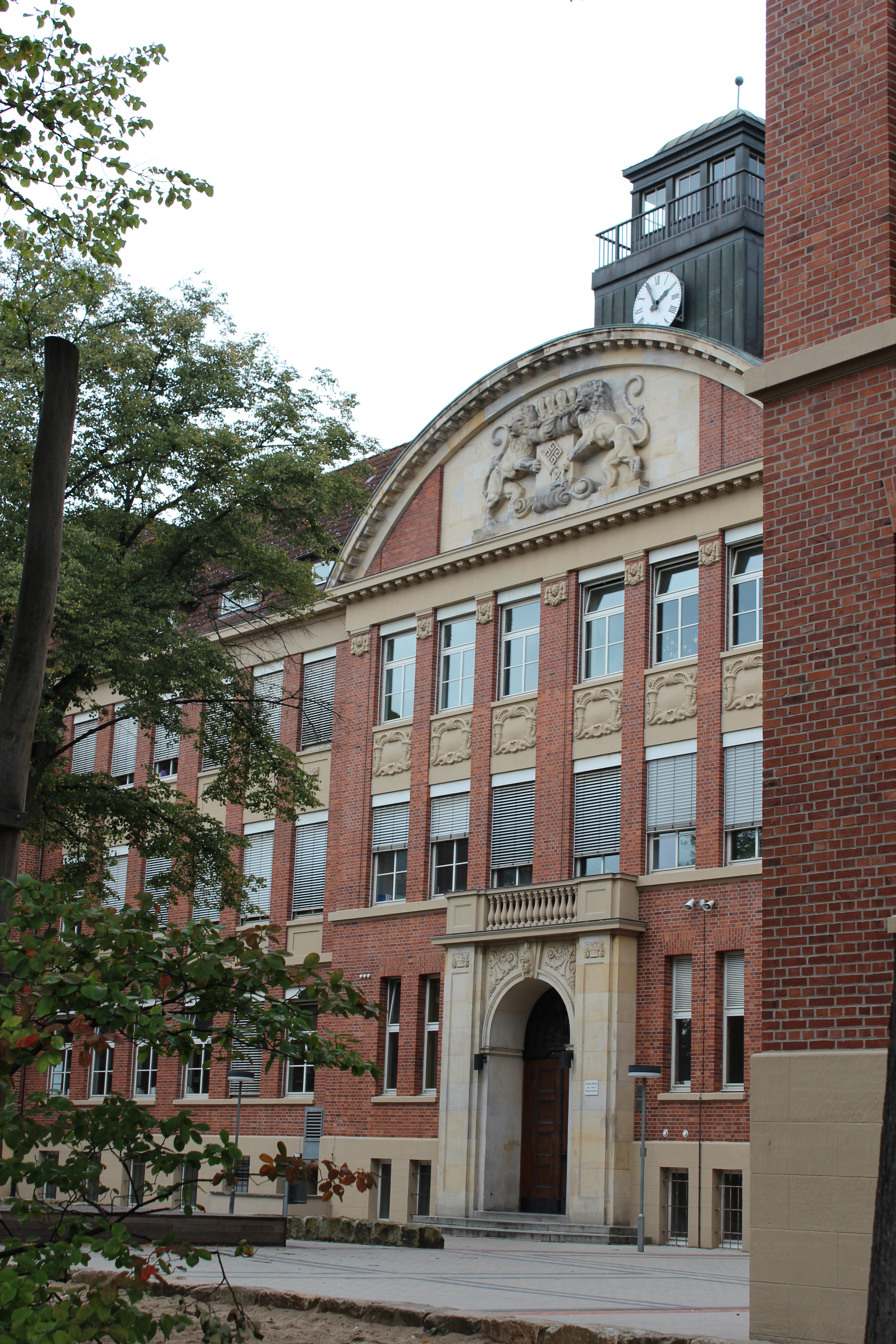 Schulzentrum Waller Ring in Bremen, Steffensweg 210 / Bremerhavener Straße 83.Das abgebildete Objekt ist ein geschütztes Kulturdenkmal in der Freien Hansestadt Bremen, mit der Nr. 1171 beim Landesamt für Denkmalpflege registriert.